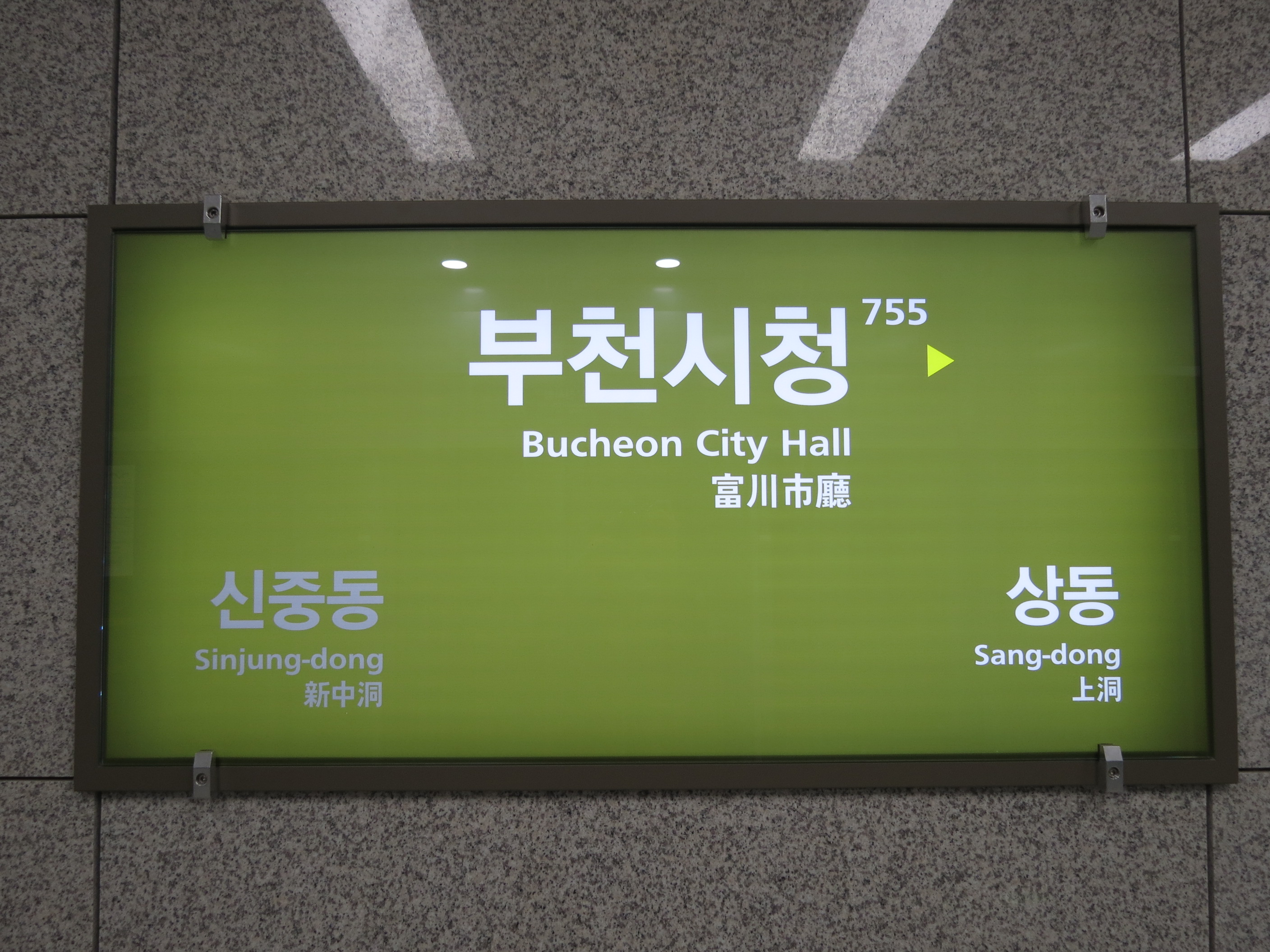 부천시청역의 역명판